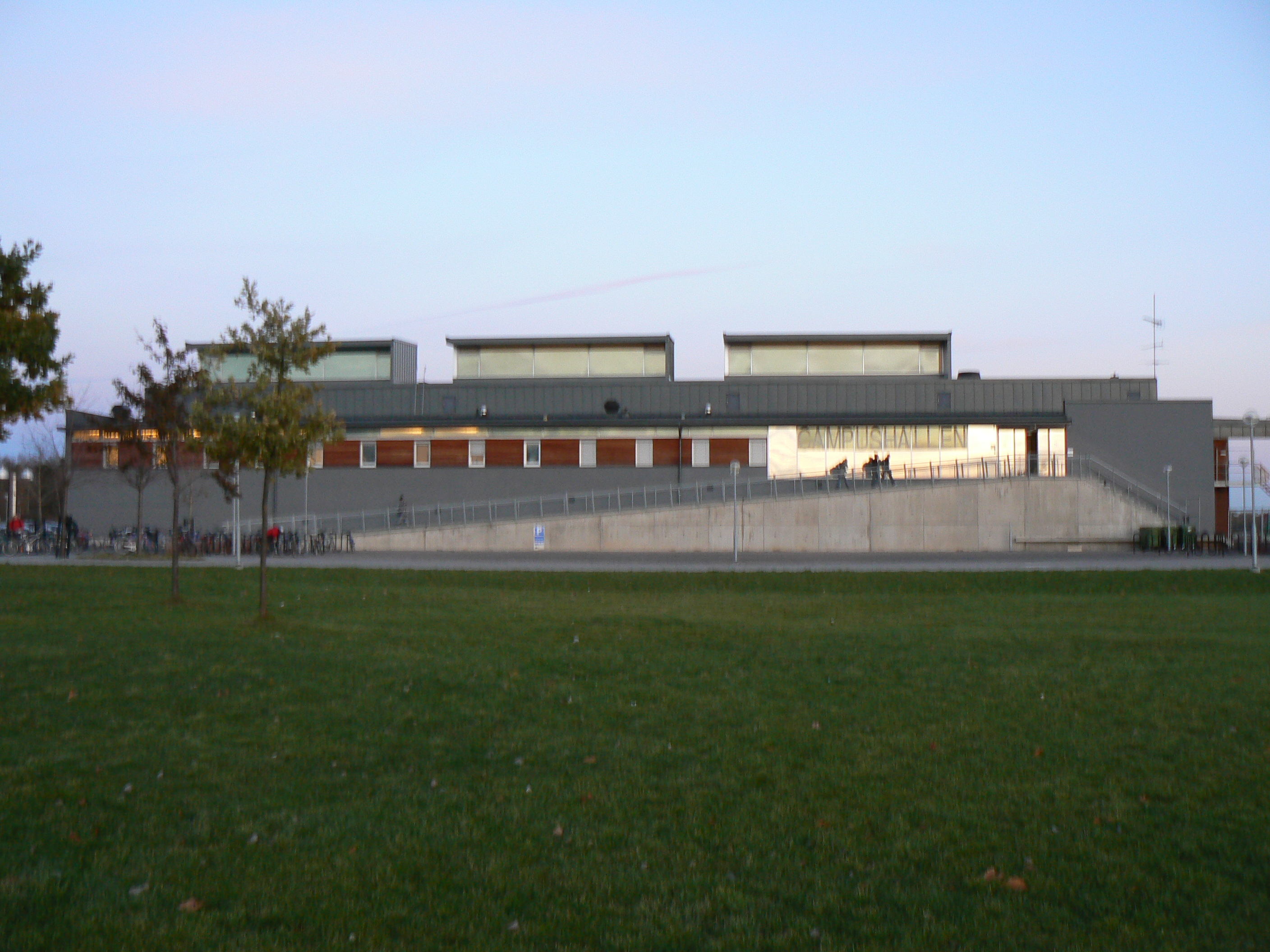 Campushallen, Linköping University. Photo by Skvattram 2006-11-09